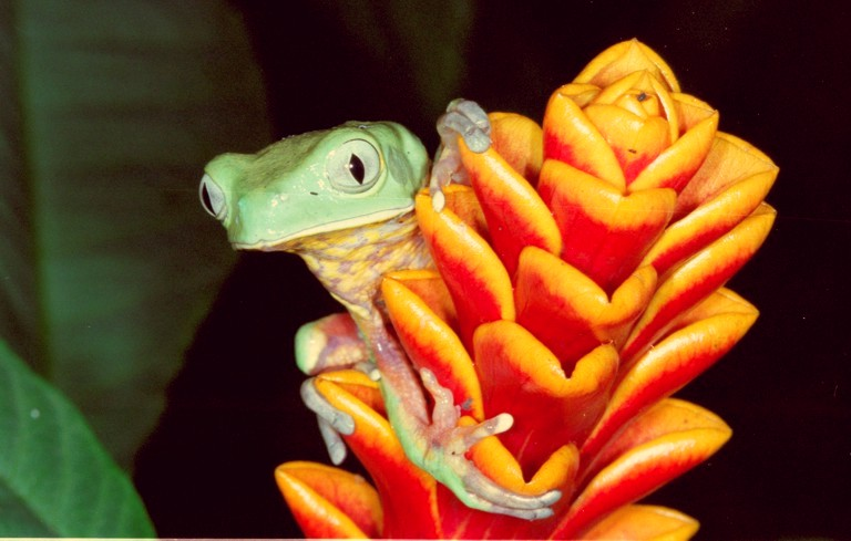 A Filomedusa (Phyllomedusa distincta) é a mascote da RPPN Santuário Rã-bugio. A espécie utiliza das lagoas da RPPN para reprodução.